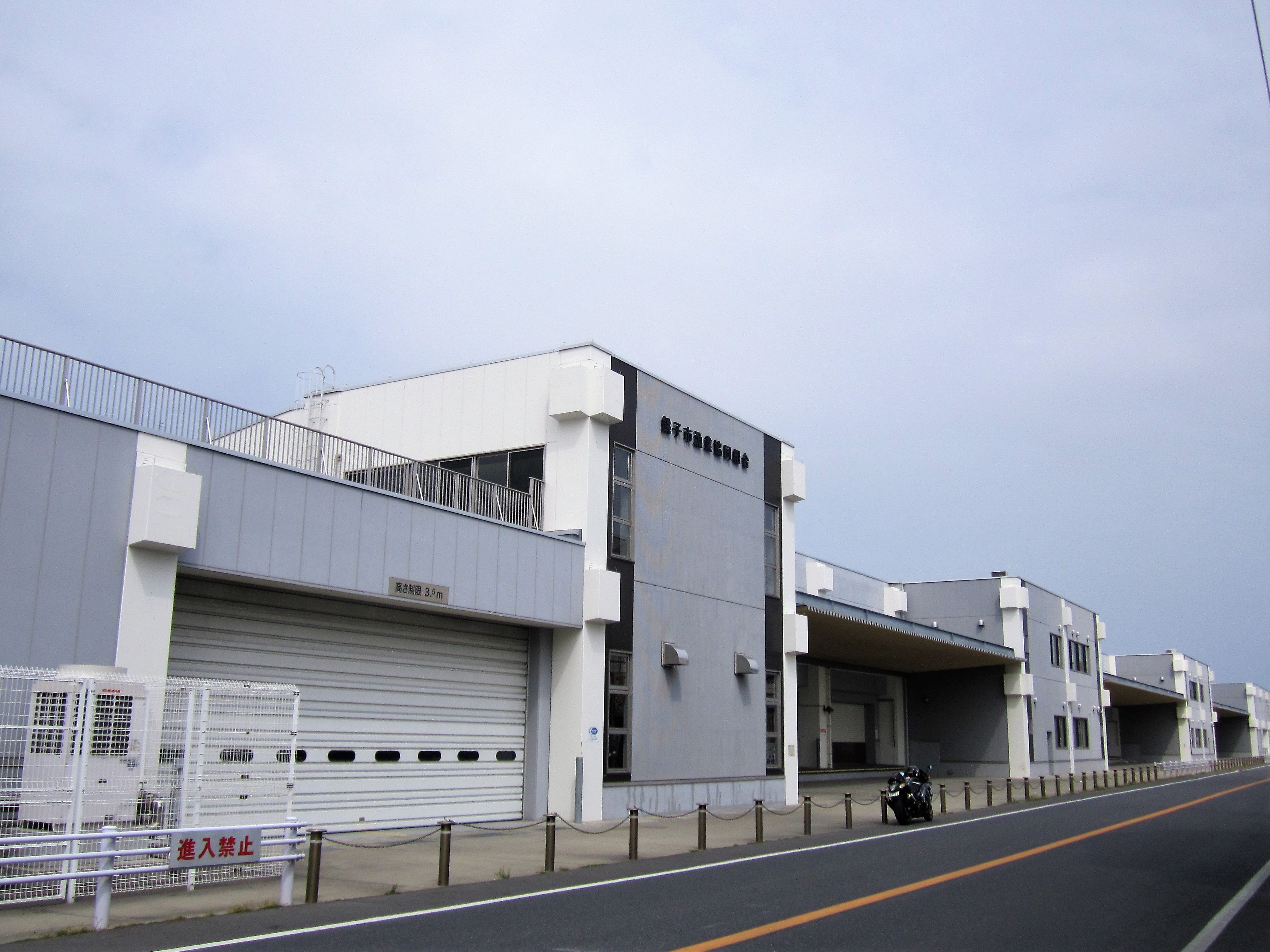 銚子漁港第一卸売市場（中央市場） Canon PowerShot A2200